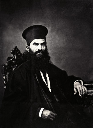 Гръцки духовник, митрополит на Цариградската патриаршия.